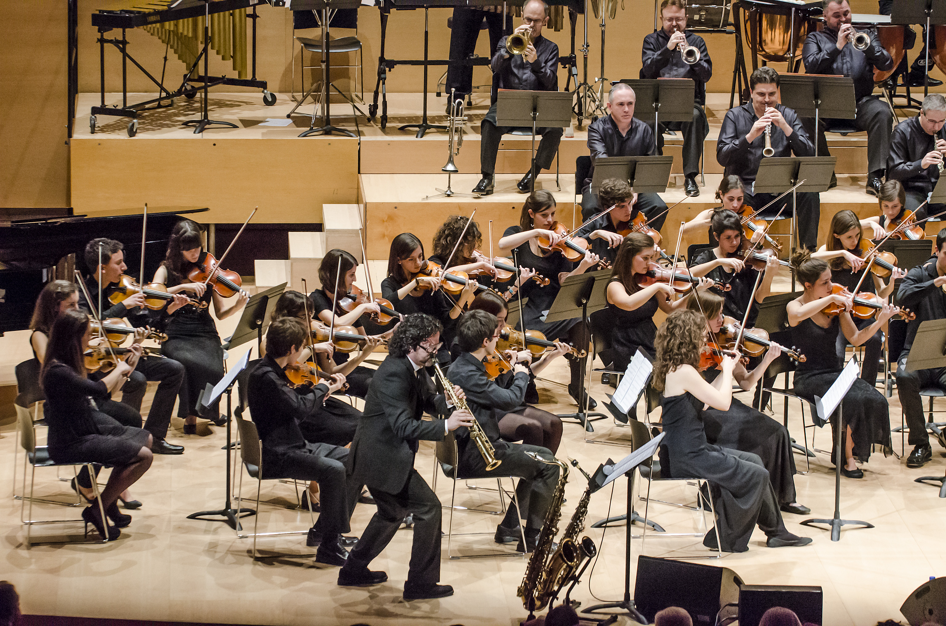 La Simfònica de Cobla i Corda de Catalunya amb el saxofonista Pep Poblet